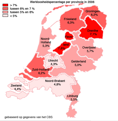 Werkloosheid in Nederland in 2006 per provincie in kaart gebracht